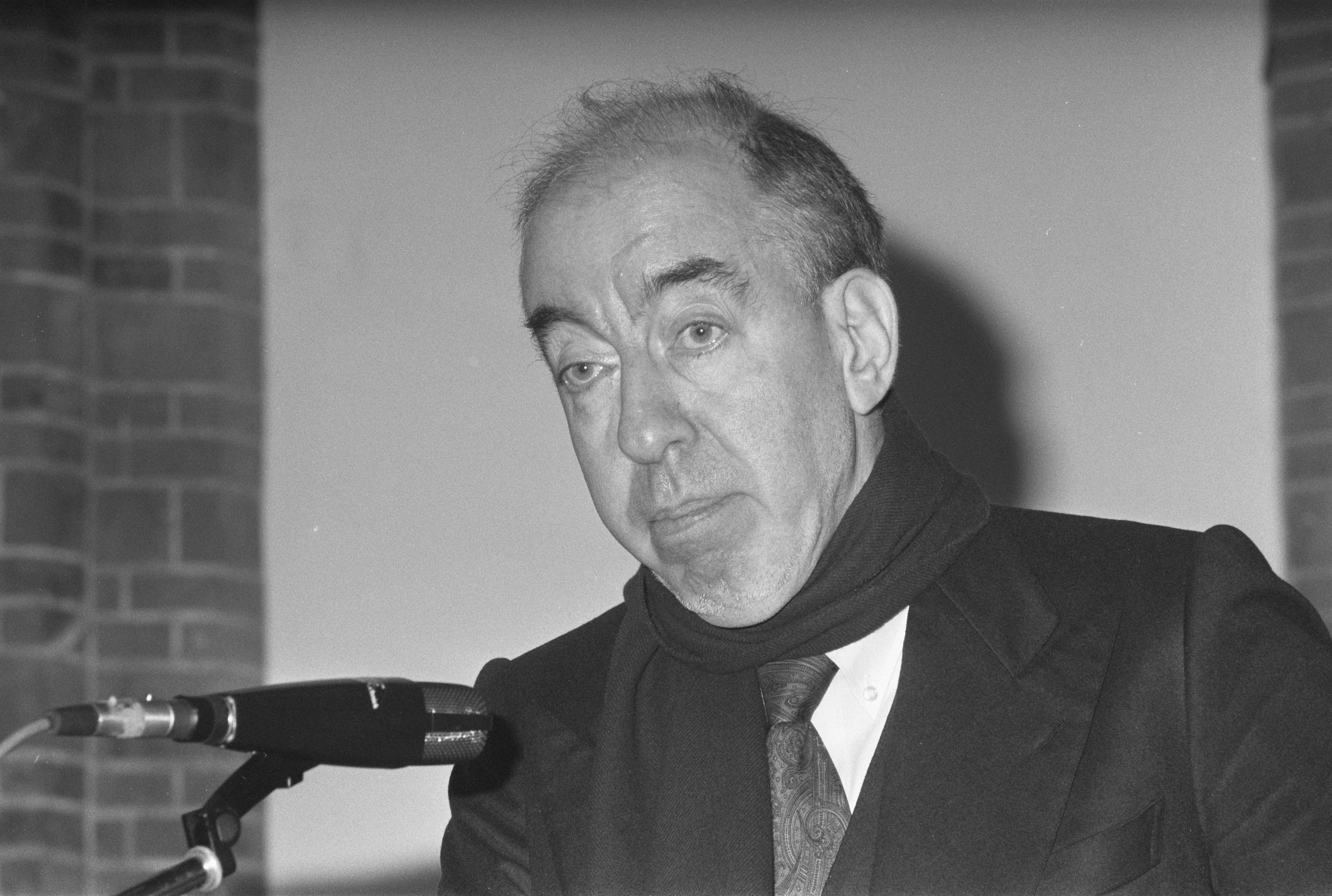 Collectie / Archief : Fotocollectie Anefo Reportage / Serie : [ onbekend ] Beschrijving : Regisseur Pieter Verhoeff en schrijfster Marijke Howeler na perspremiere "van geluk gesproken"; presentatie Fonds Victor Hugo ; uitgever Johan Polak / Datum : 17 november 1987 Trefwoorden : Regisseurs, premieres, schrijfsters, uitgevers Persoonsnaam : Verhoeff, Pieter Fotograaf : Bogaerts, Rob / Anefo Auteursrechthebbende : Nationaal Archief Materiaalsoort : Negatief (zwart/wit) Nummer archiefinventaris : bekijk toegang 2.24.01.05 Bestanddeelnummer : 934-1311